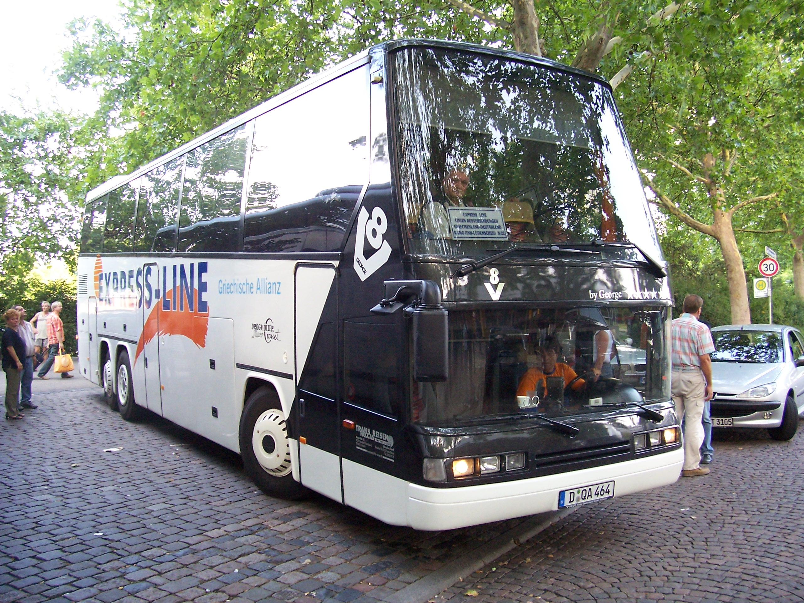 Ein Drögmöller Super Comet Reisebus in Mannheim.